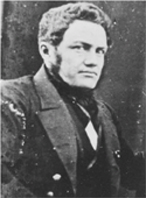 A.T.v.Middendorff, 1855